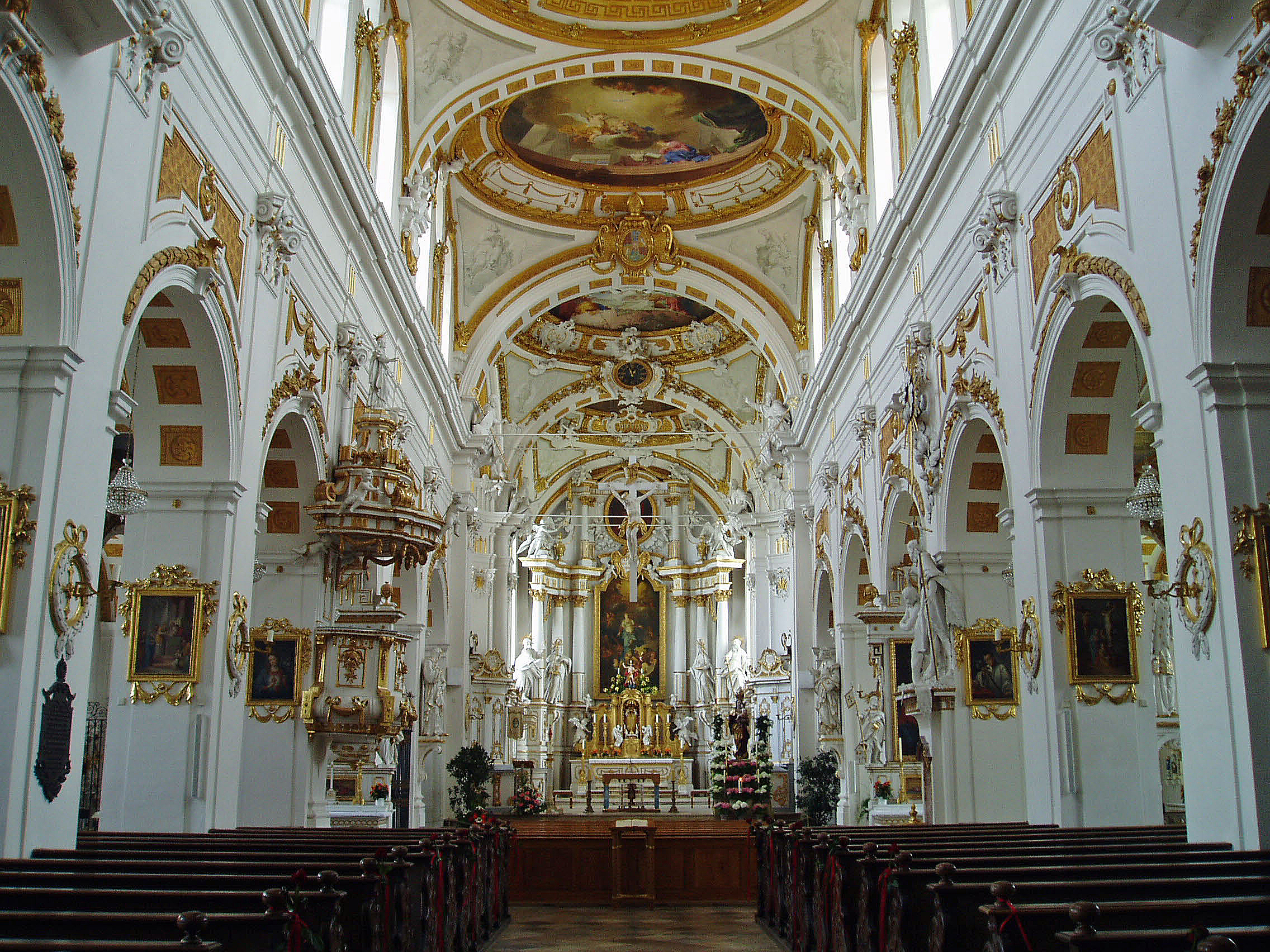 église abbatiale d'Elchingen (Allemagne)